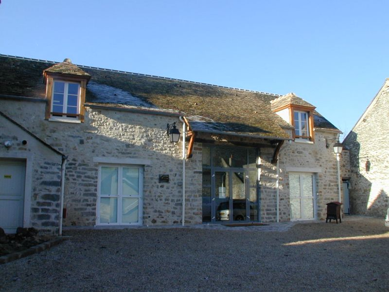 Photo de la médiathèque municipale de Moigny-sur-Ecole